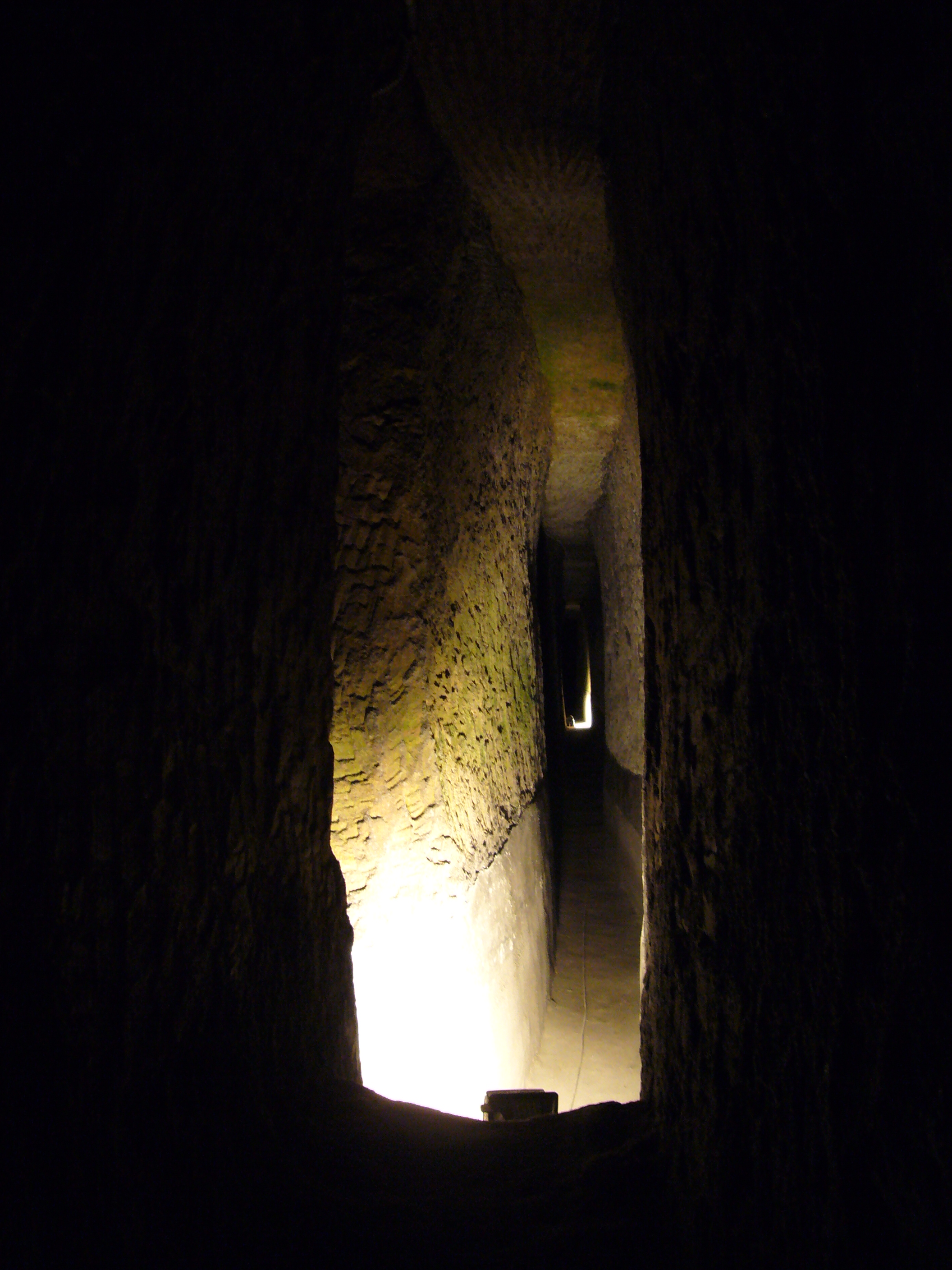 Napoli sotterranea (da piazza San Gaetano): cunicolo